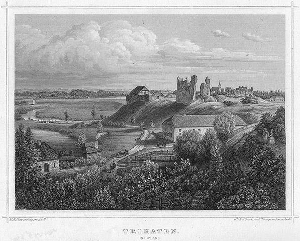 Vaade Trikatale 1866 a.